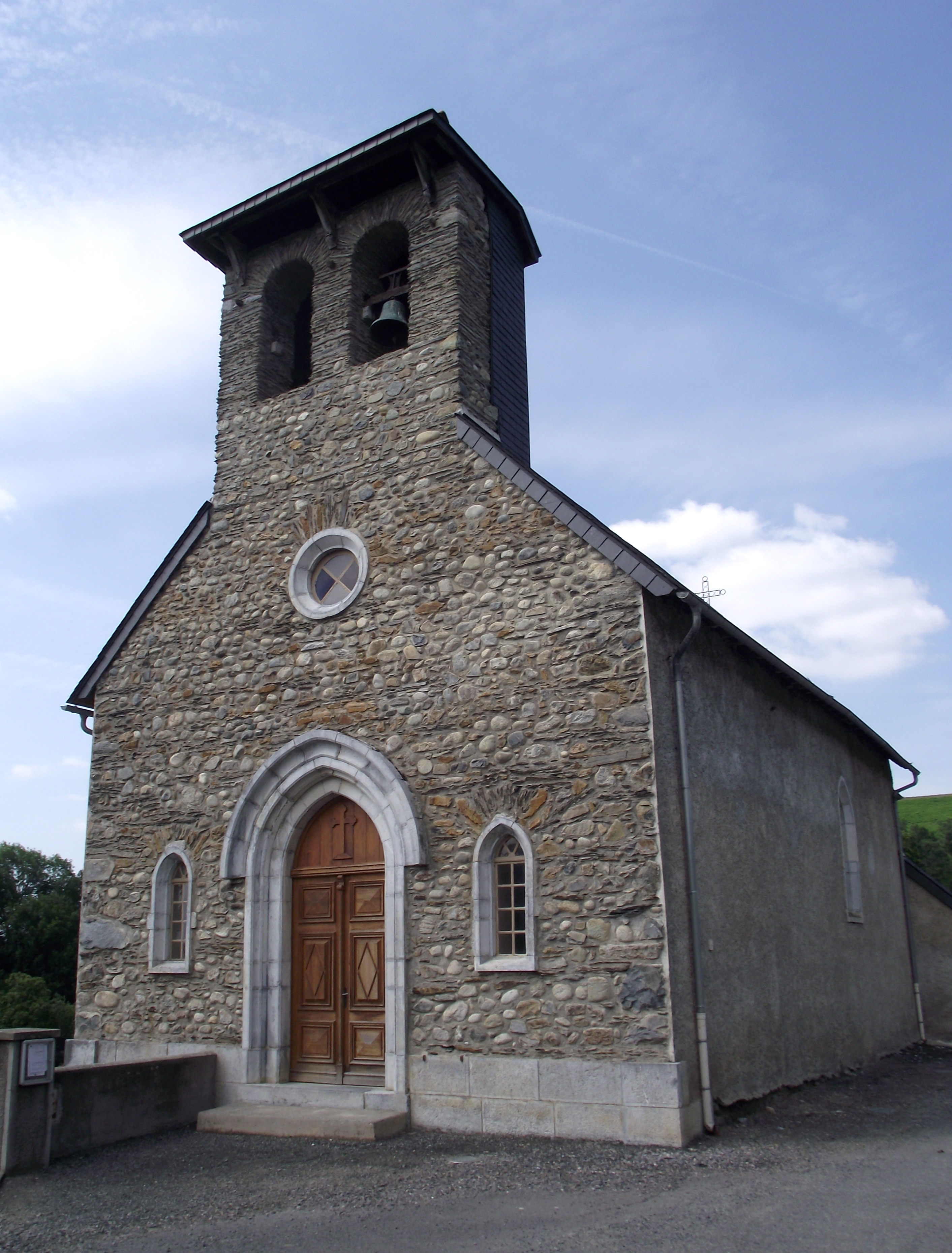 Chapelle Saint-Martin de Julos-Les Granges, Hautes-Pyrénées, France